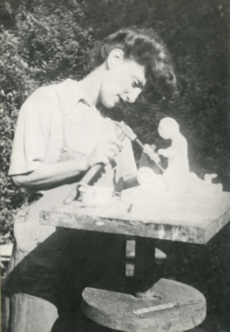 Halina Korn